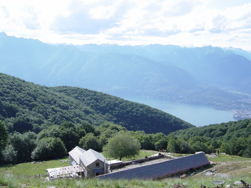 Alpe di Cedullo